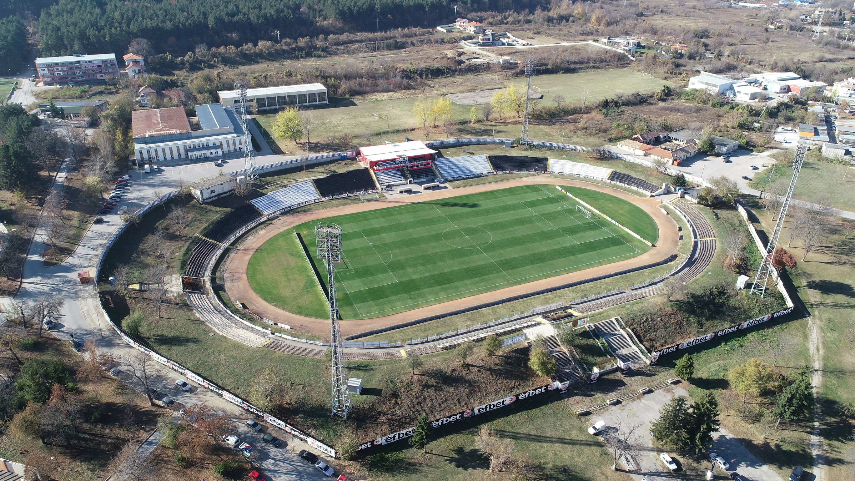 Стадион Локомотив - Горна Оряховица